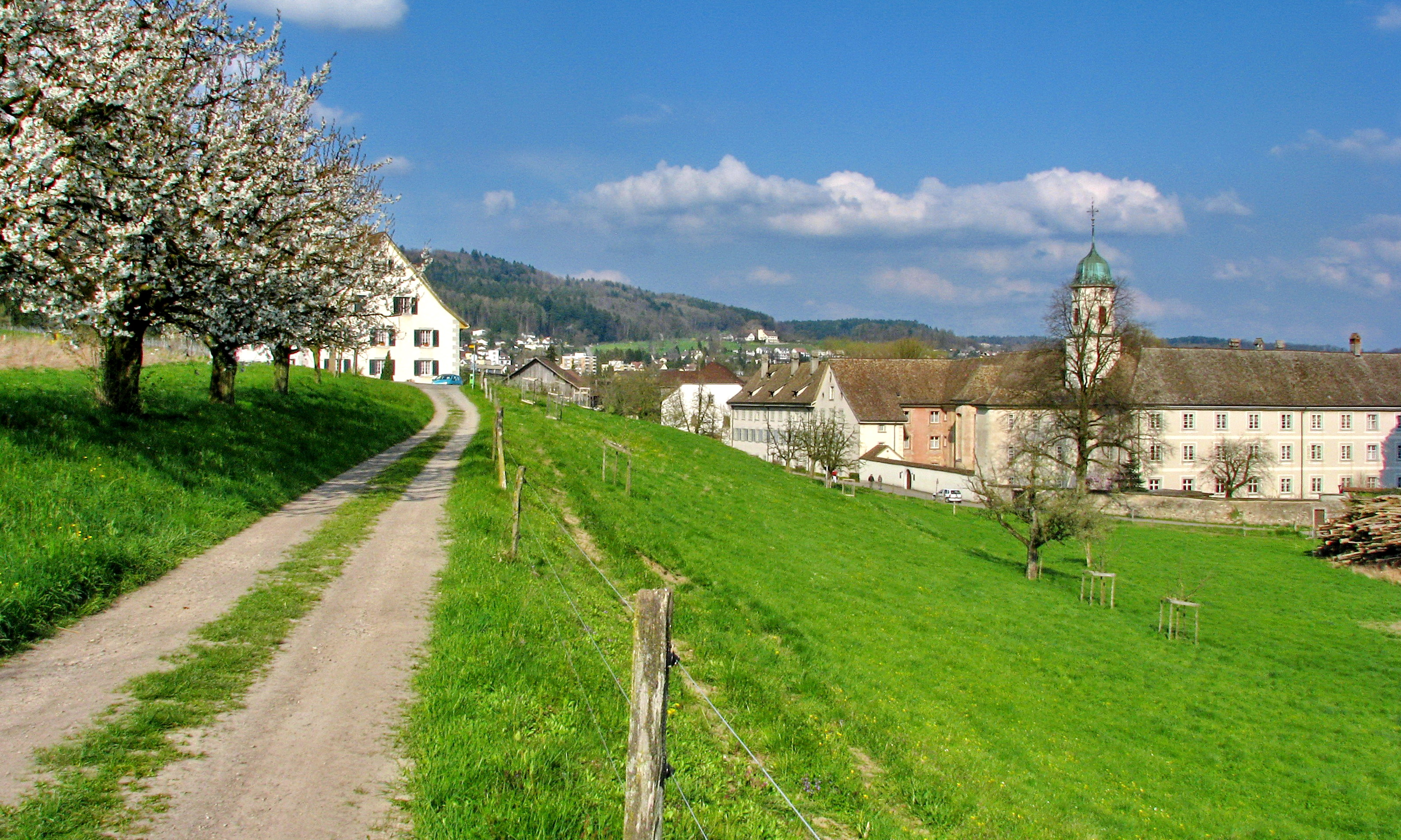 Kloster Fahr in Würenlos, Unterengstringen to the left, Limmattal in the background.